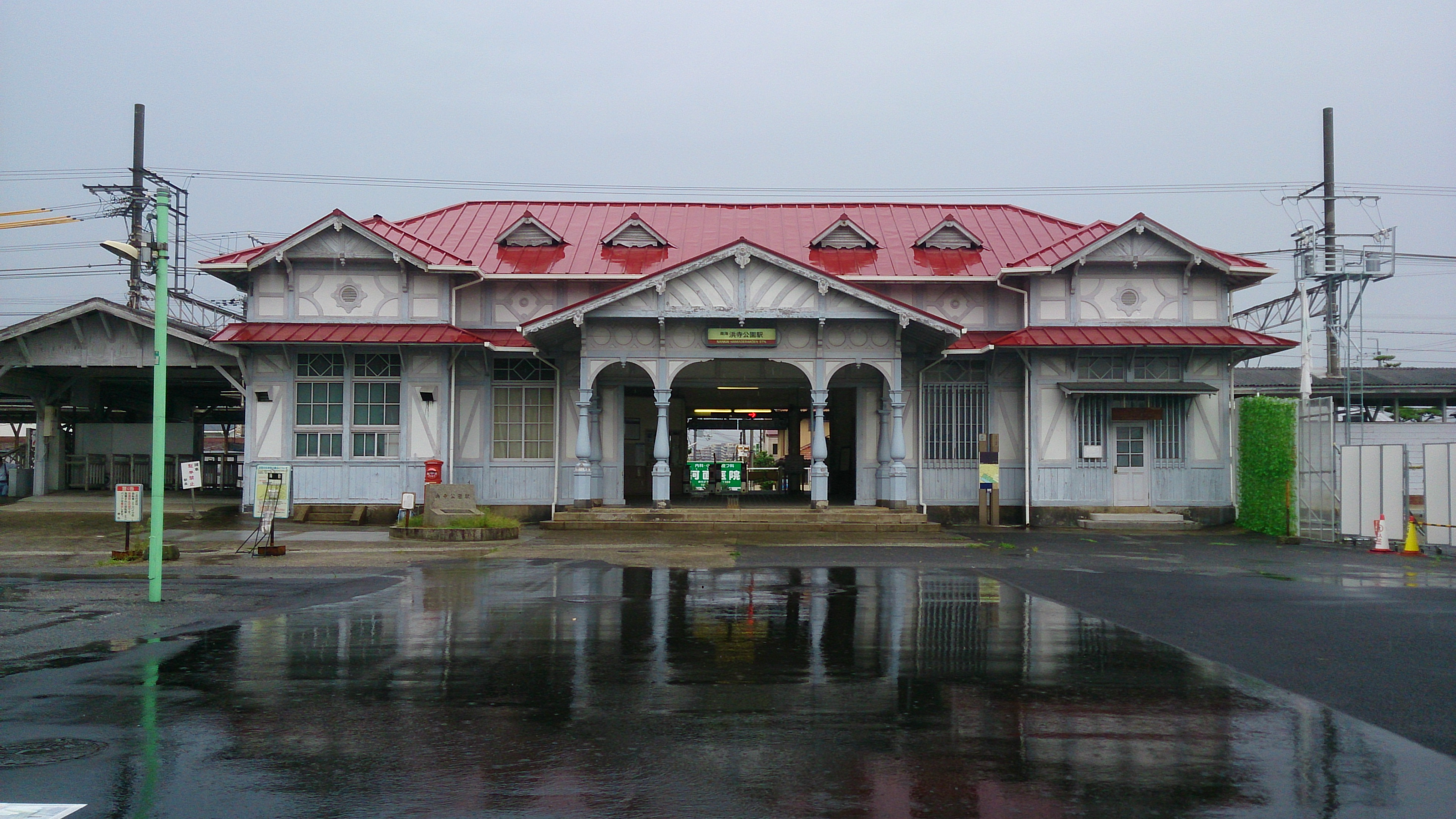 浜寺公園駅